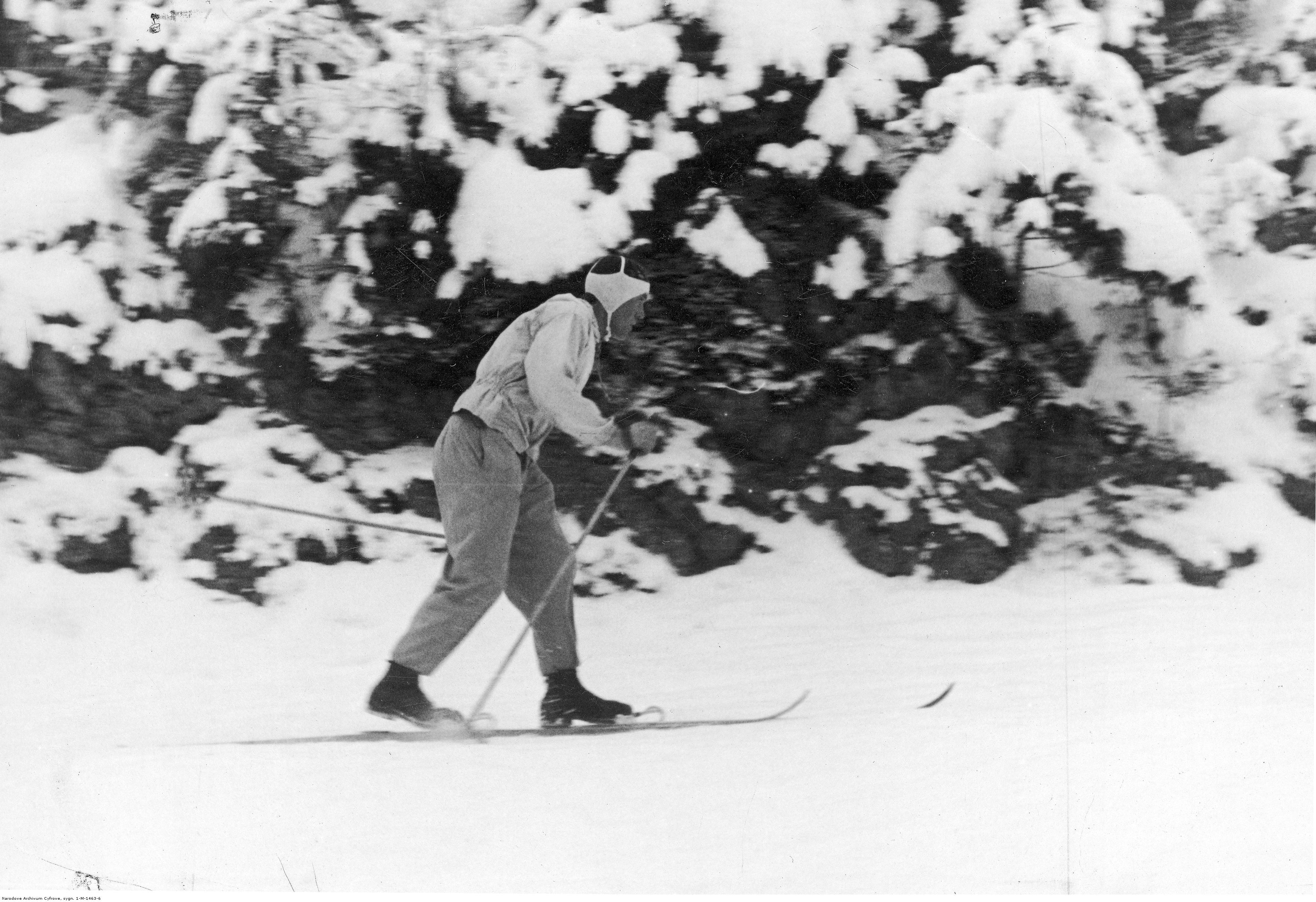 Międzynarodowe Zawody Narciarskie o Mistrzostwo Okręgu Podhalańskiego w Zakopanem. Bronisław Czech podczas treningu przed biegiem na dystansie 18 km. 1939-02 (Koncern Ilustrowany Kurier Codzienny - Archiwum Ilustracji)